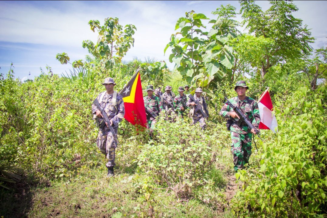 Osttimoresische Grenzpolizei (Unidade da Polícia de Fronteiras UPF), zusammen mit Soldaten der indonesischen Armee auf Patrouille